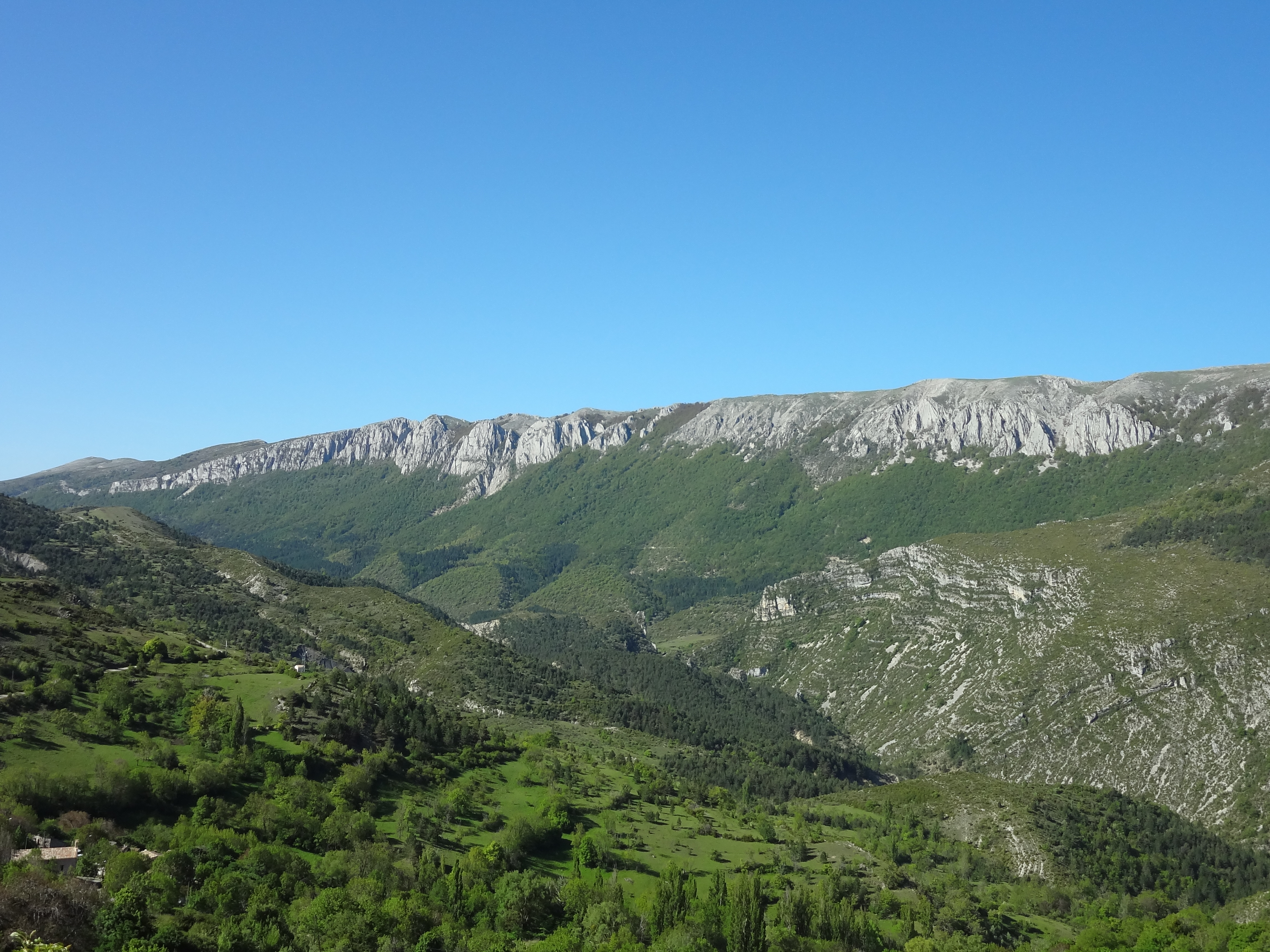 Vue du Serre de Montdenier (1650-1720 m)